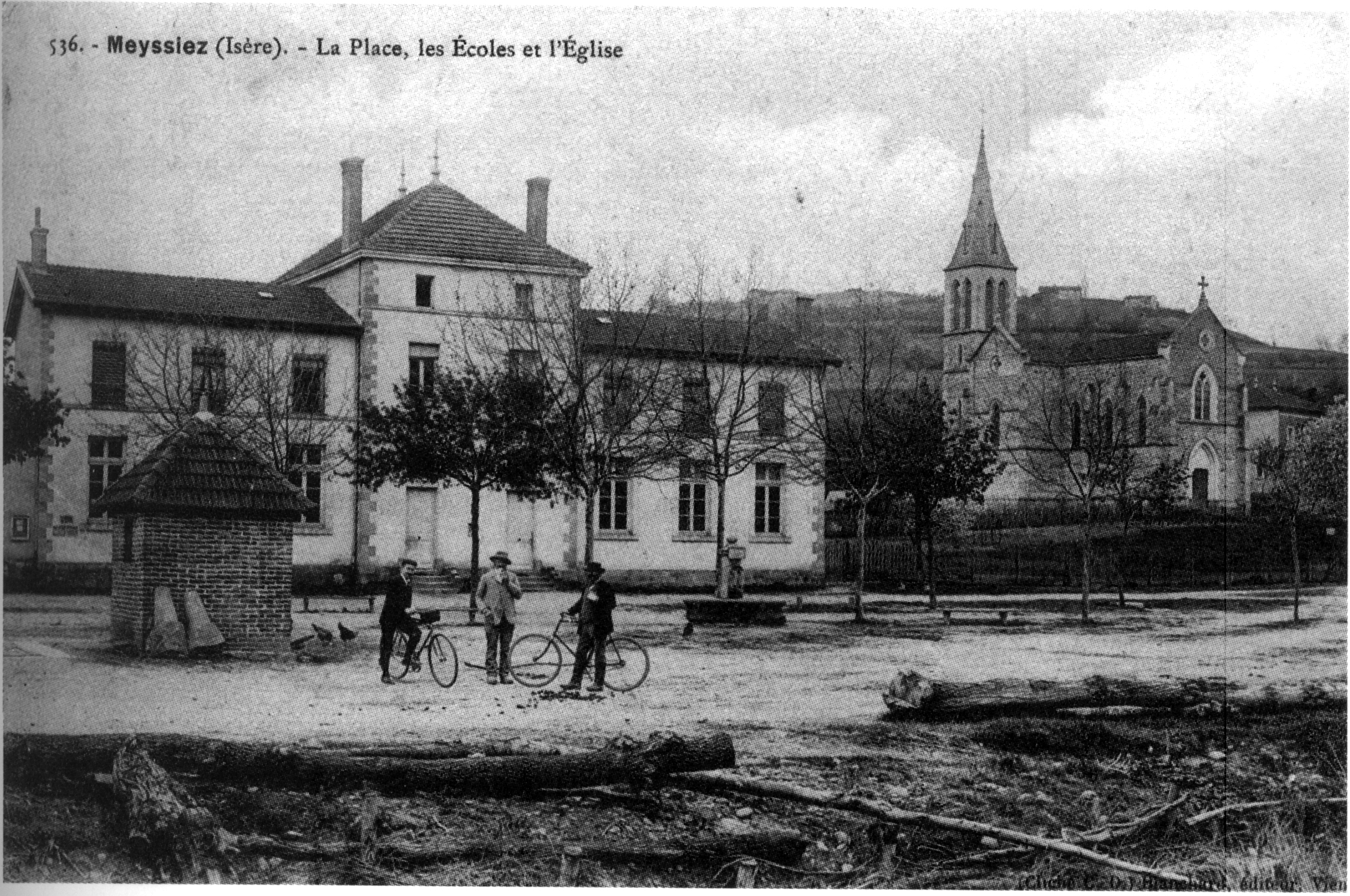 Meyssiez : la place, les écoles et l'église en 1912.